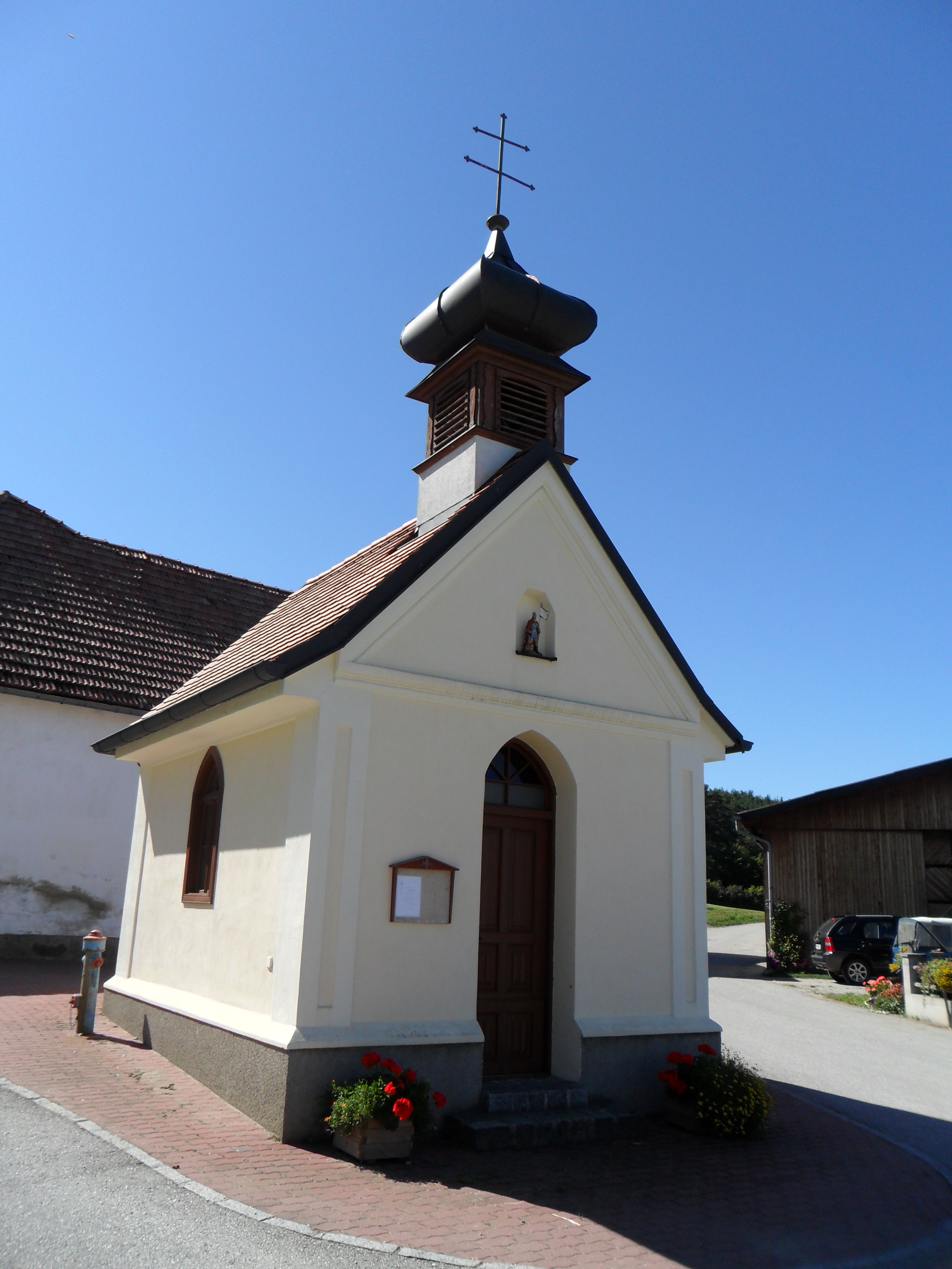 Ortskapelle in Weibnitz (Katastralgemeinde Straßhof, Gemeinde Wartmannstetten)